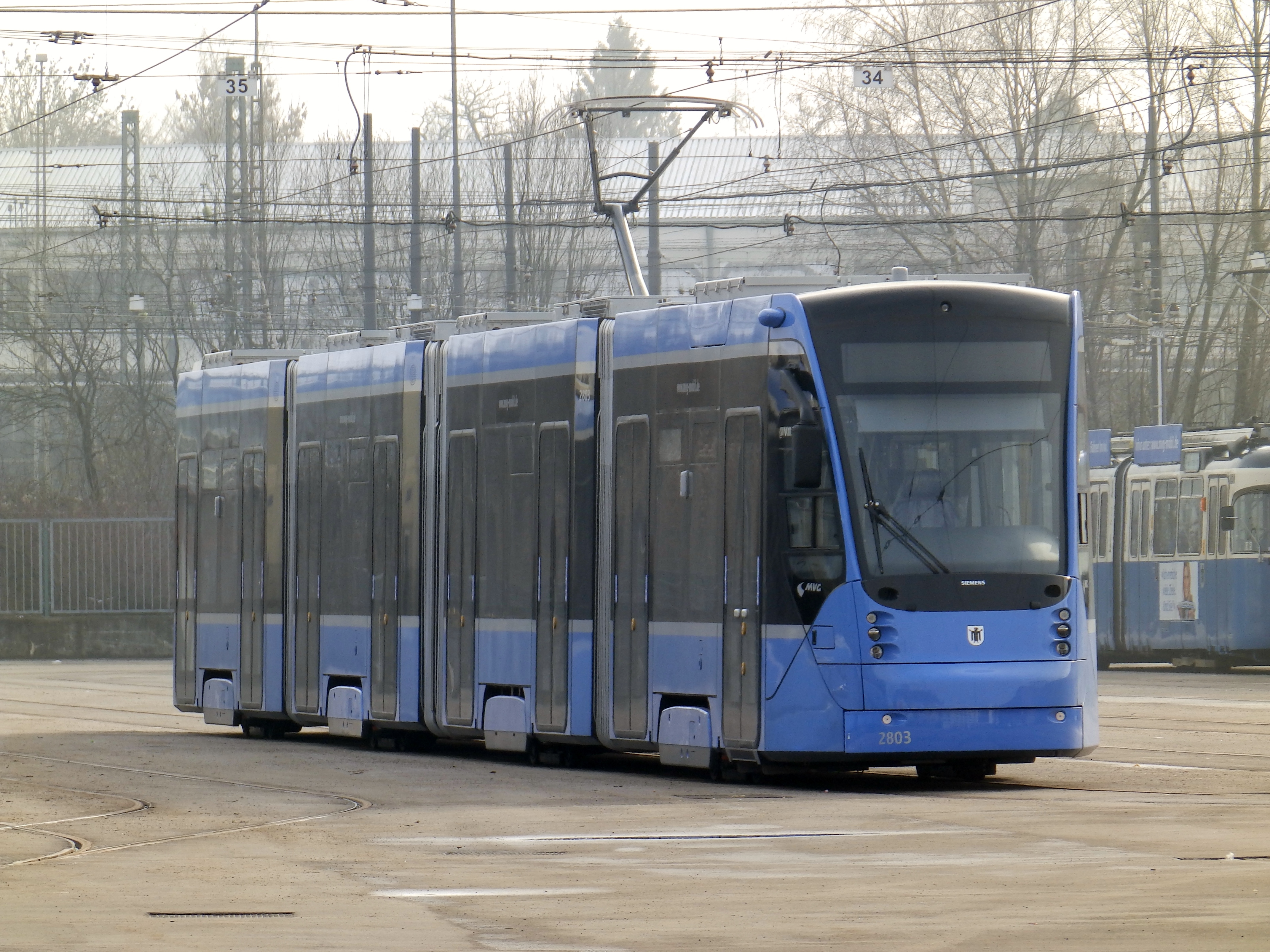 Siemens Avenio in München in der Einsteinstraße im Betriebshof 2